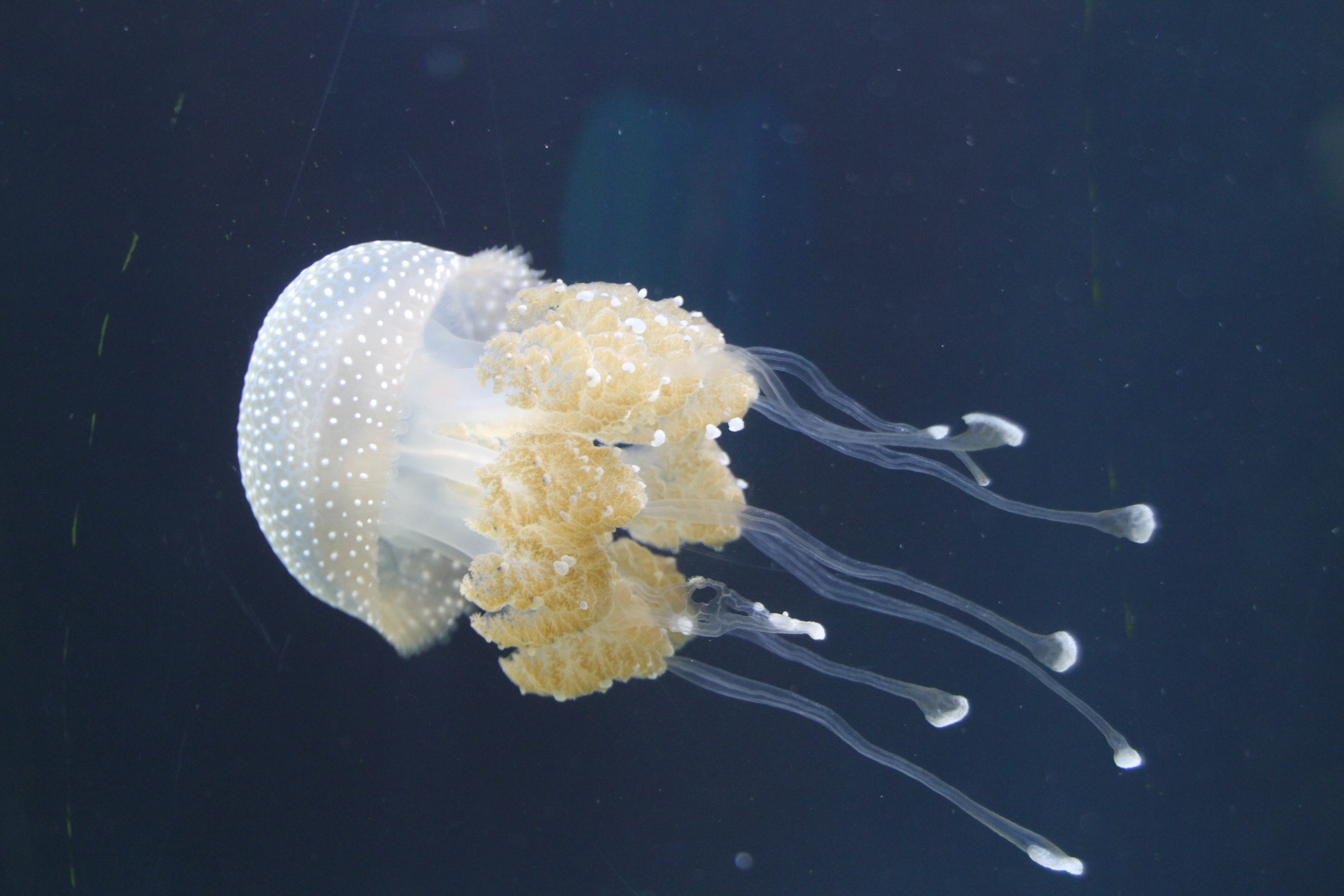 Blue blubber jelly